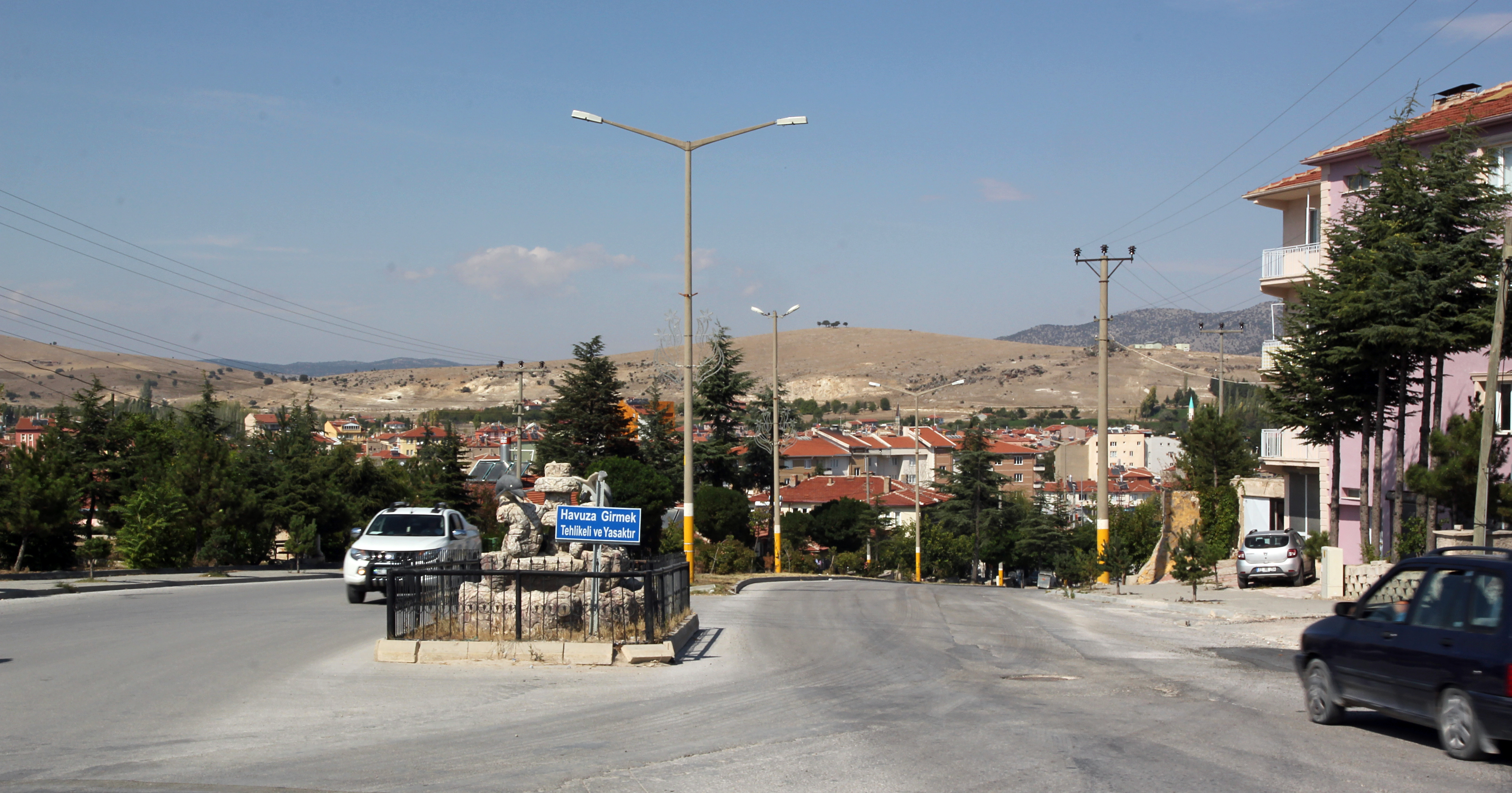 Bayat, Kreisstadt in der Provinz Afyonkarahisar, Zentraltürkei